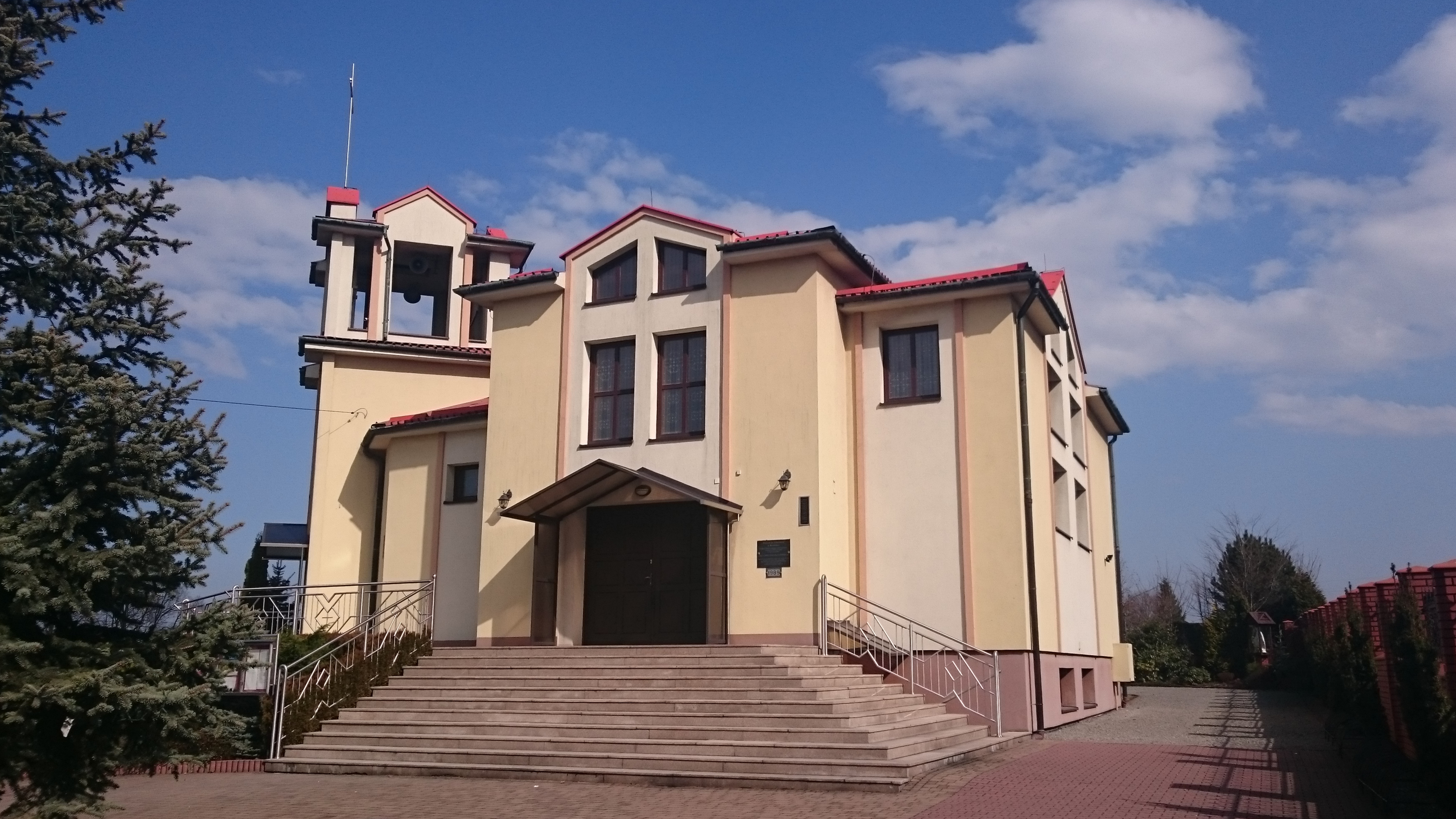 Bestwinka, kościół św. Sebastiana